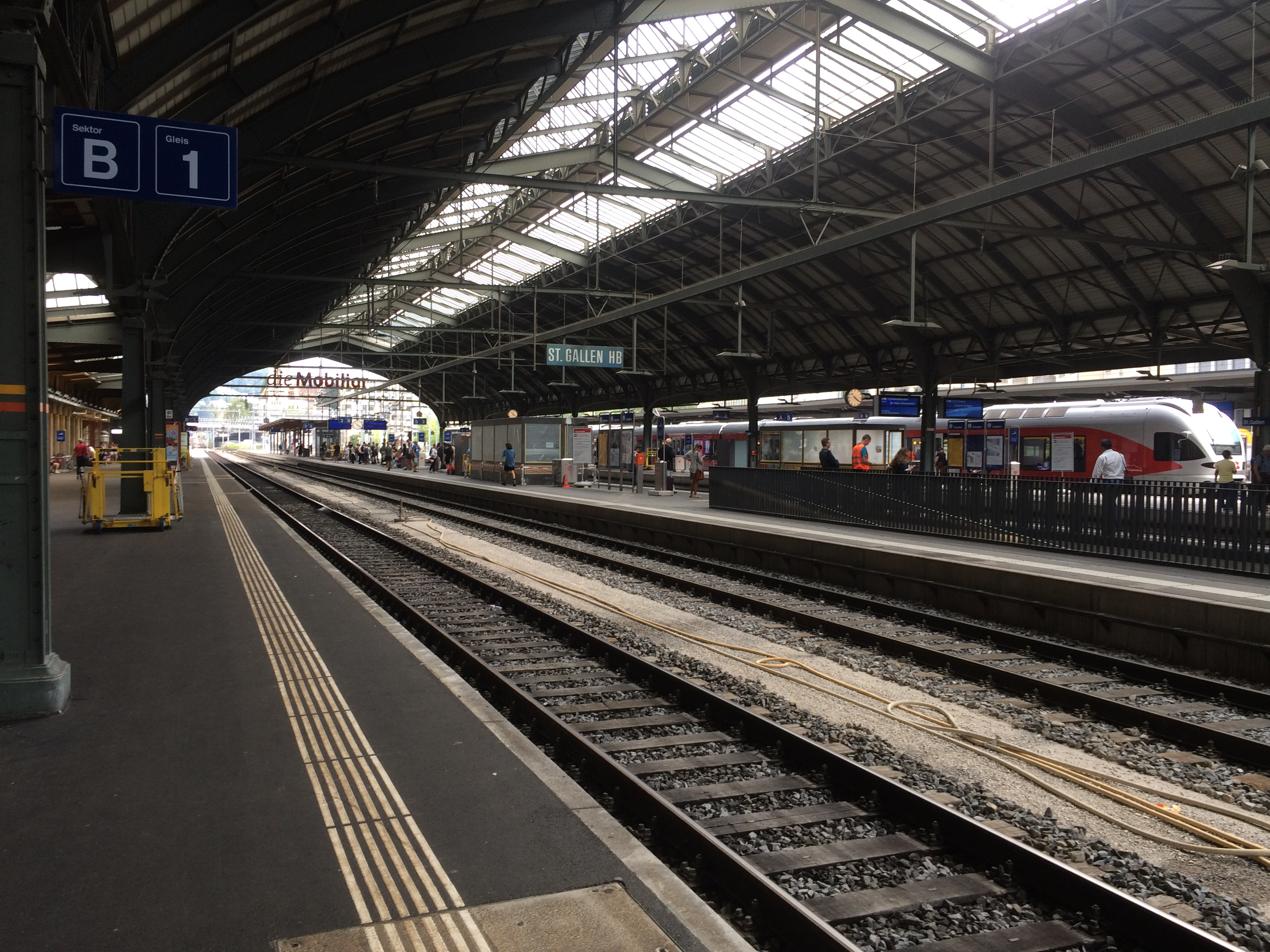 Die Bahnsteige im Bahnhof St.Gallen 2018